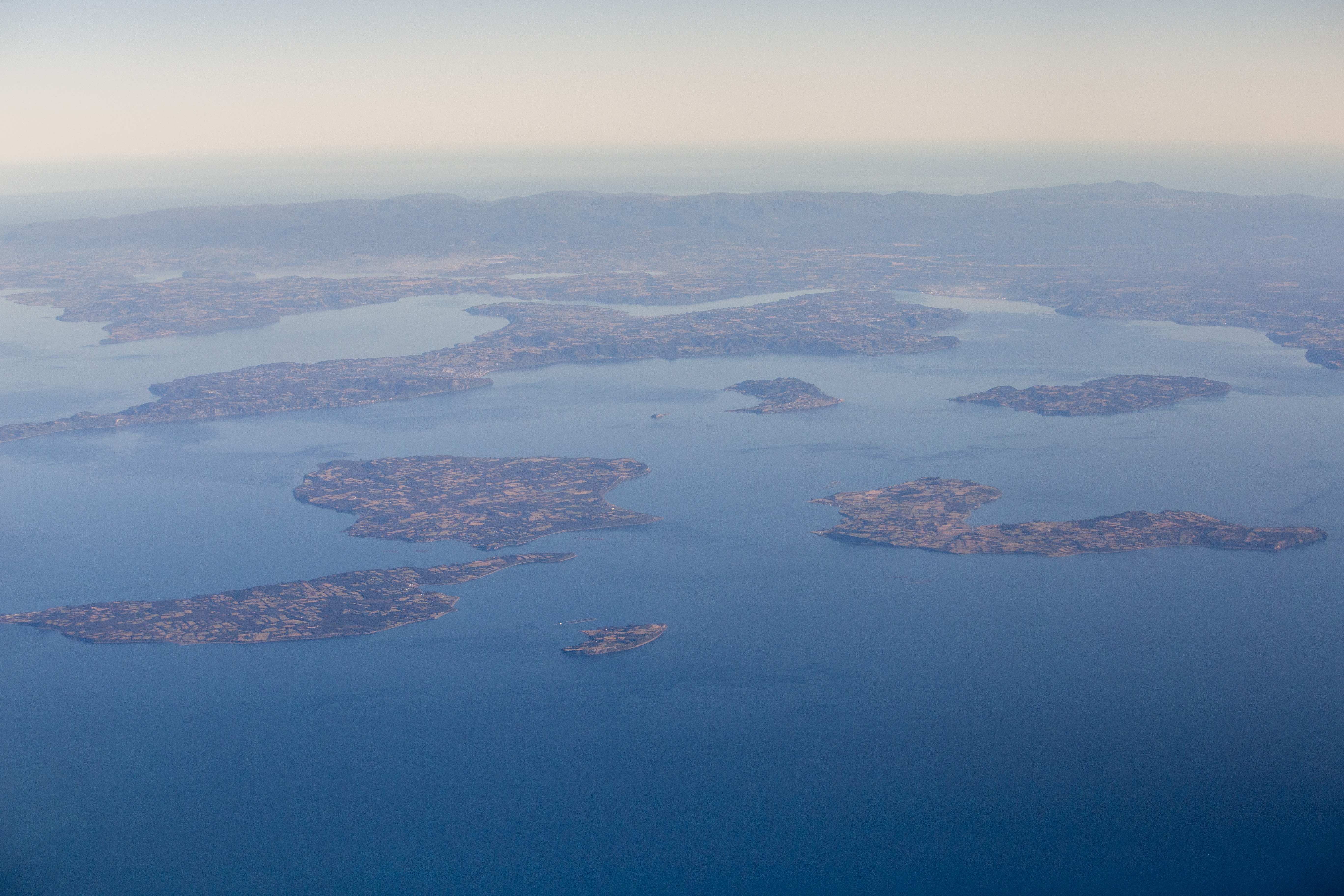 Islas de Caguach, Quenac, Teuquelín, Meulín, Linlín, Llingua y Quinchao. Archipiélago de Chiloé, Chile.